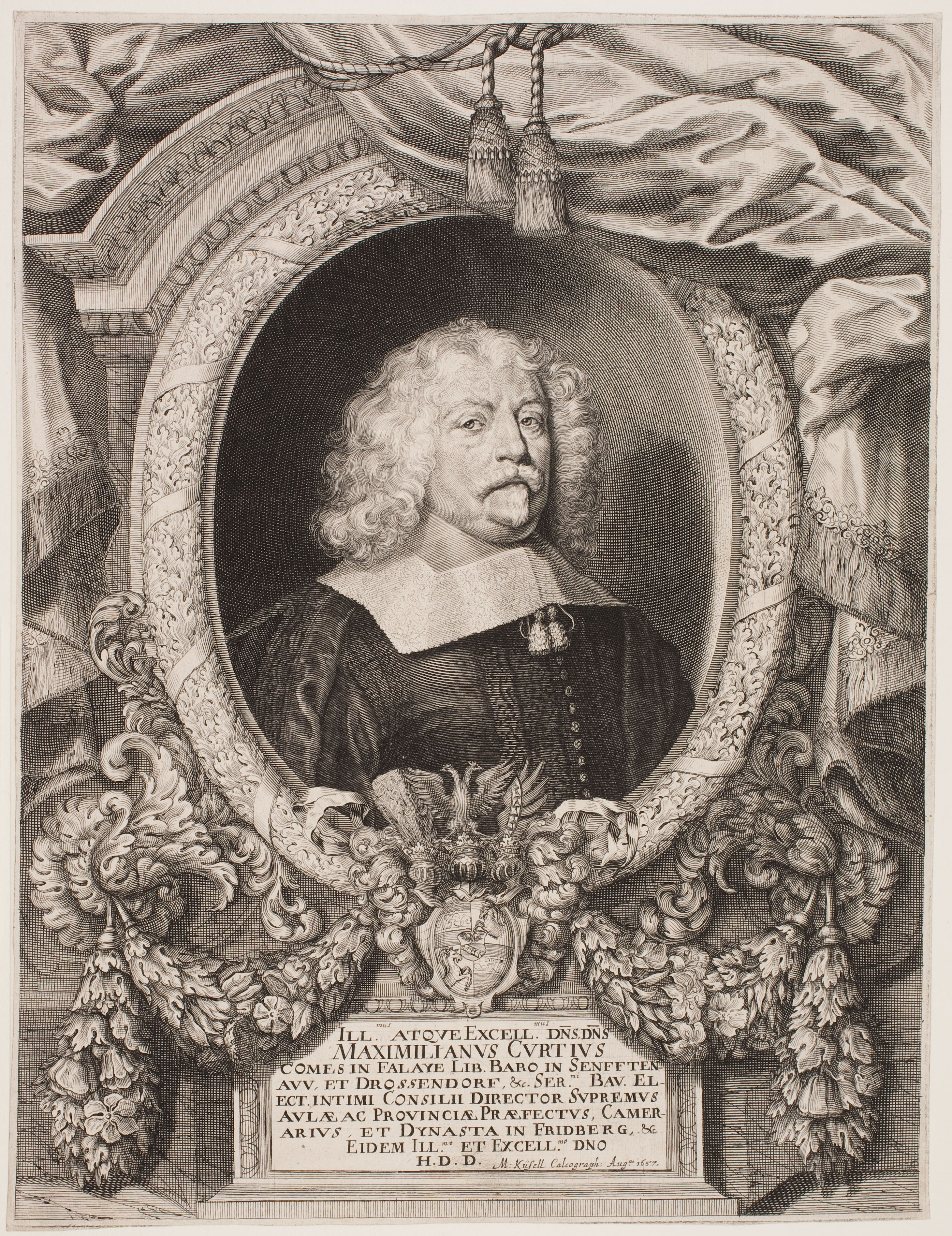 Bildnis Maximilian Kurtz (von Senftenau) (1638 Graf von Valley); Kupferstich; Wolfenbüttel, Herzog August Bibliothek, Inventar-Nr. A 26779